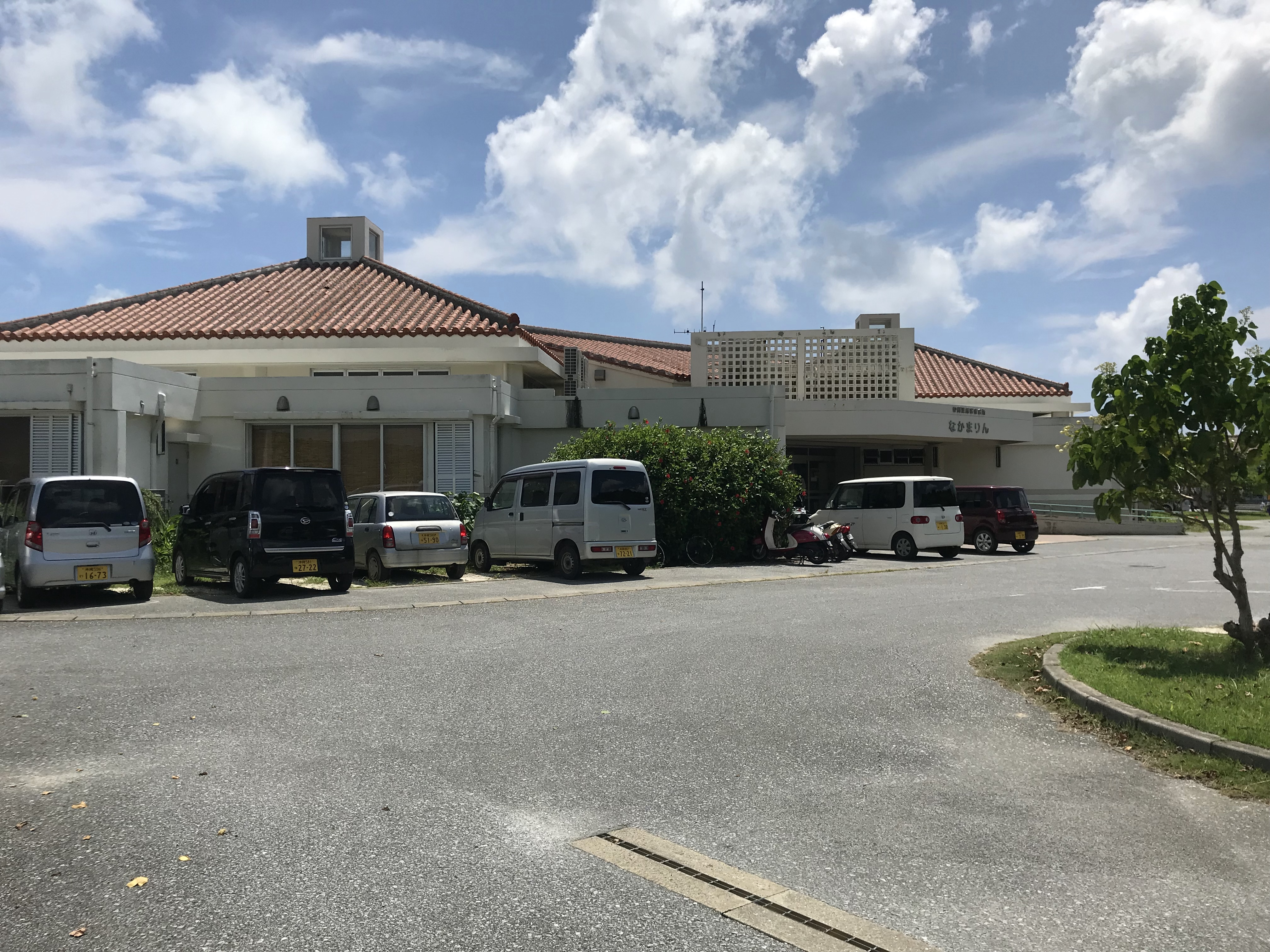 沖縄県竹富町西表島仲間港（大原港）